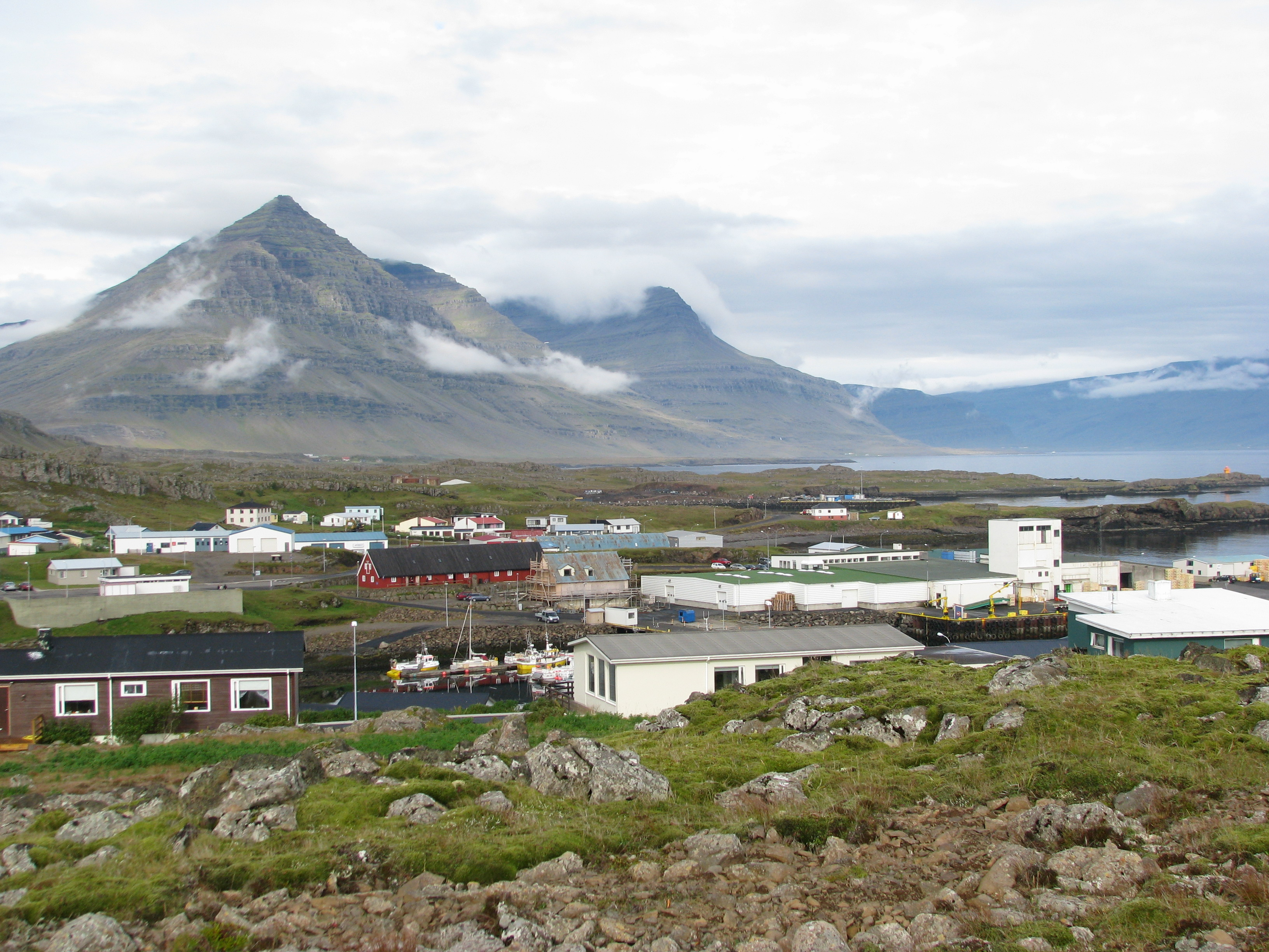 Die Ortschaft Djúpivogur, Island; im Hintergrund der Berg Búlandstindur